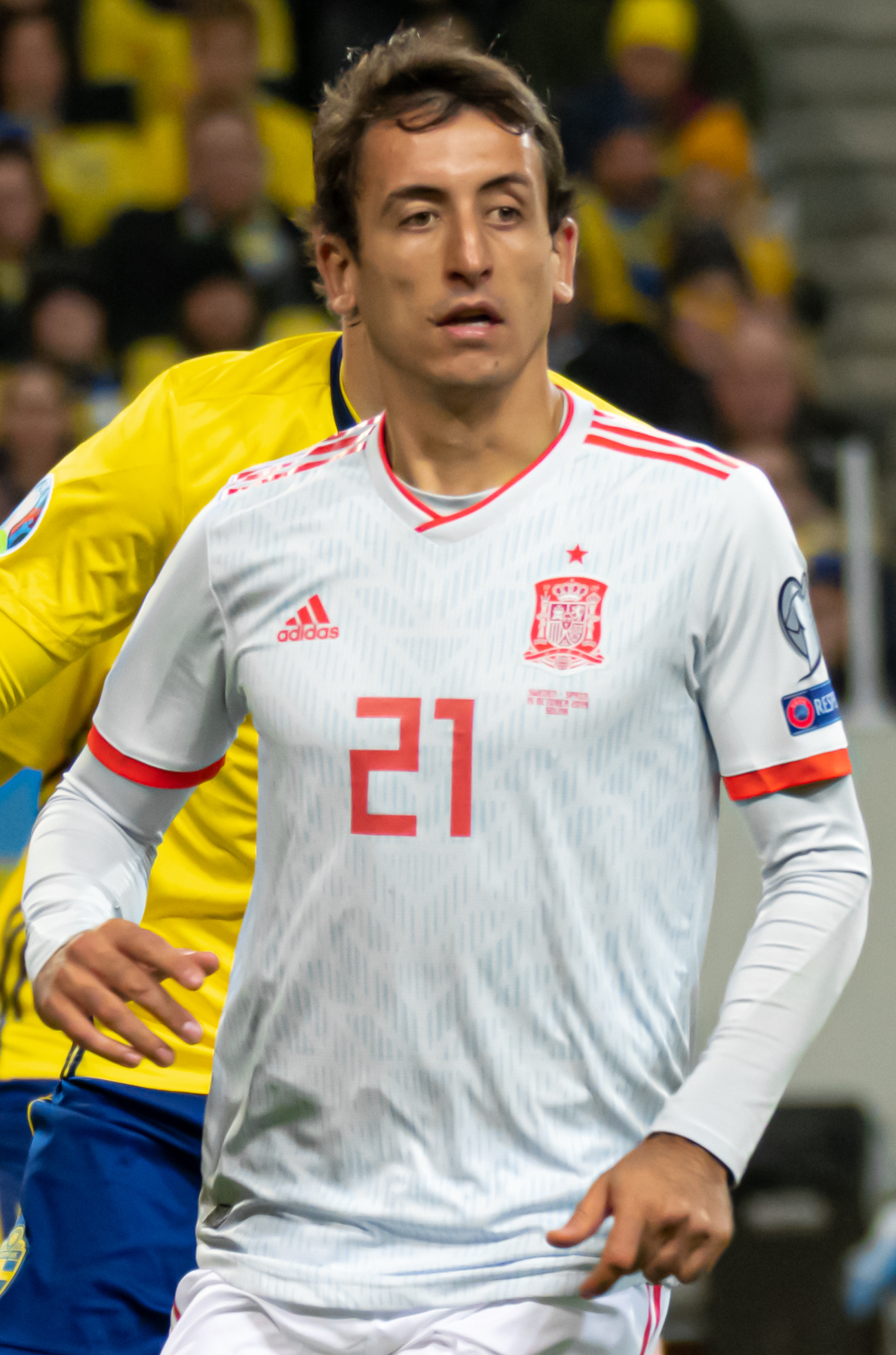 UEFA EURO qualifiers Sweden vs Spain 20191015